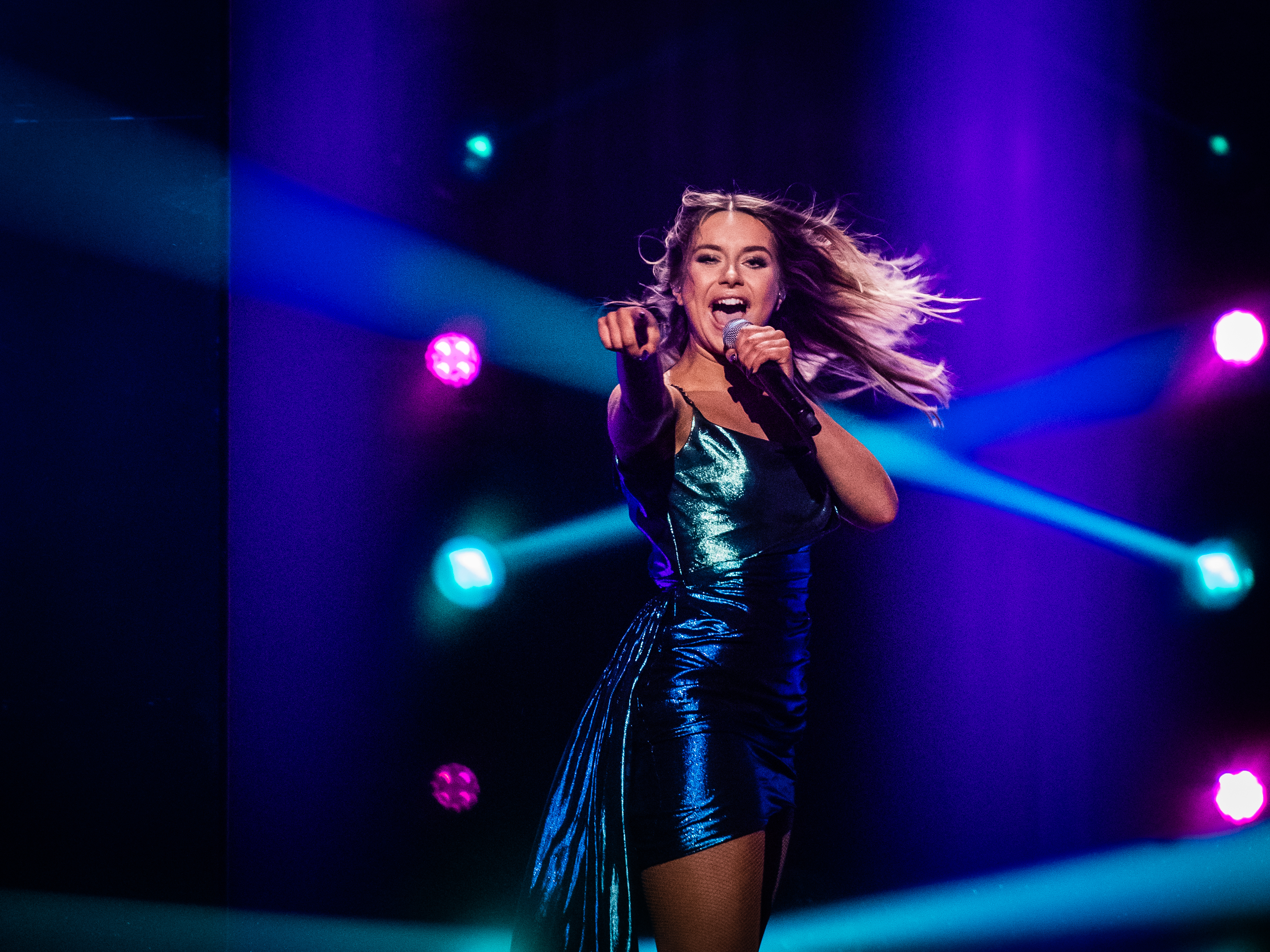 Hanna Ferm sjunger sitt nummer Brave i finalen i Melodifestivalen 2020 på Friends Arena